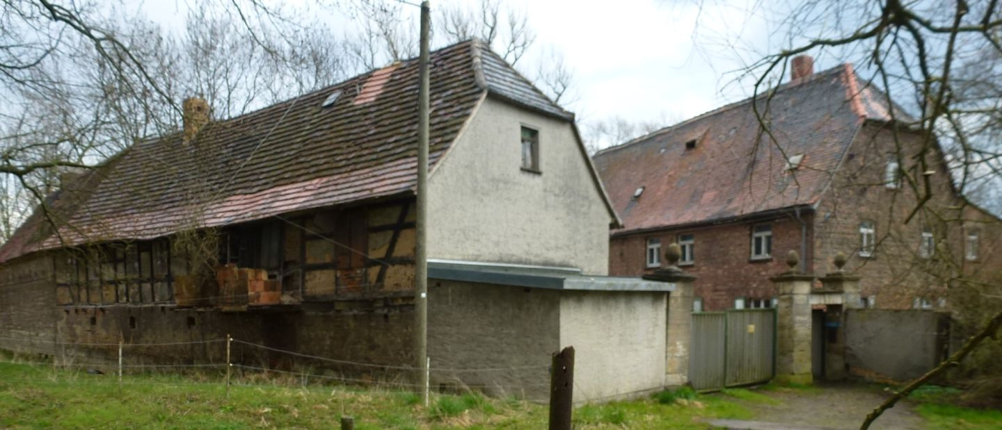 Mühle in Poserna